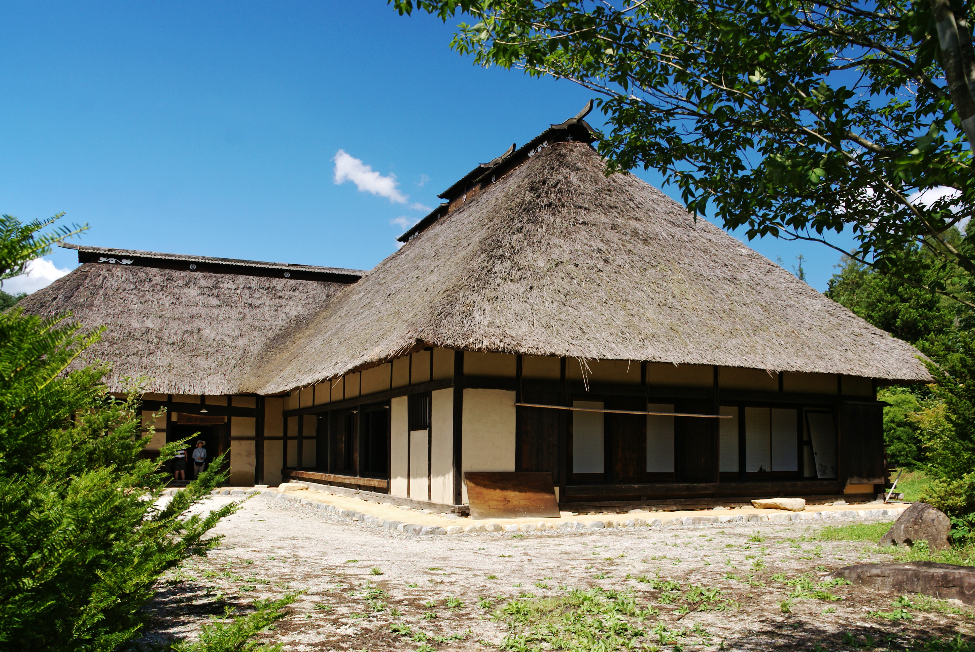 Tono Furusato-mura in Tono, Iwate prefecture, Japan